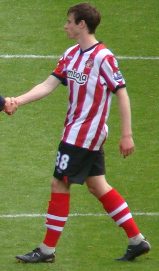 SAFC